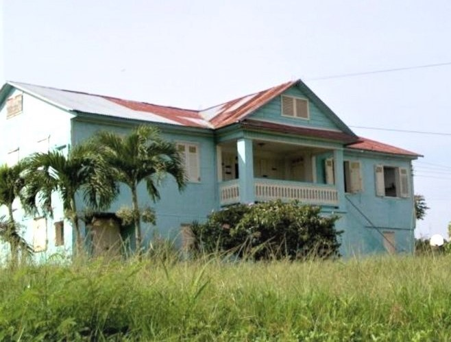 Casa de Don Juan Rosa Mora, Capáez, Hatillo, Puerto Rico